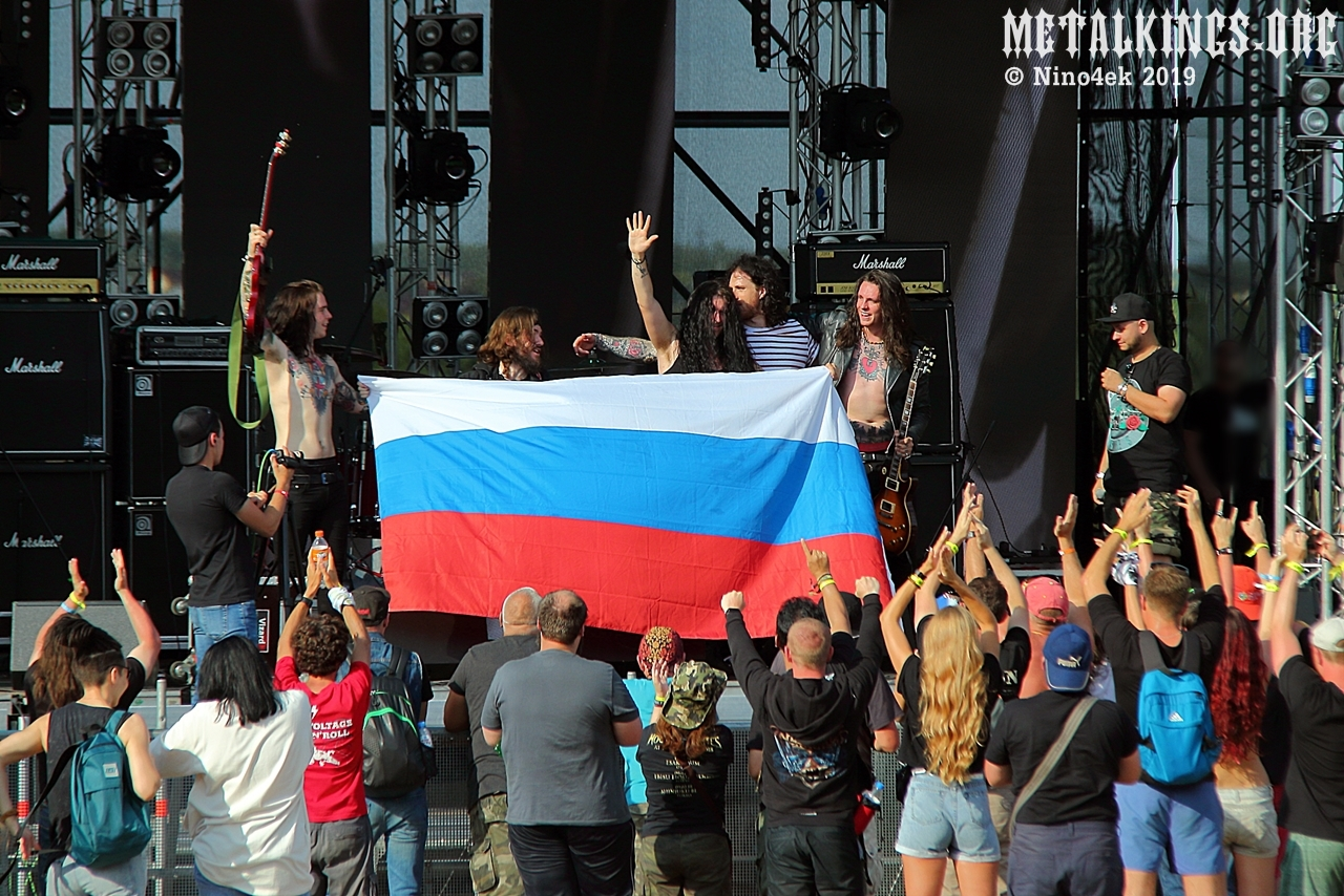 The Treatment на фестивале Big Gun 2019